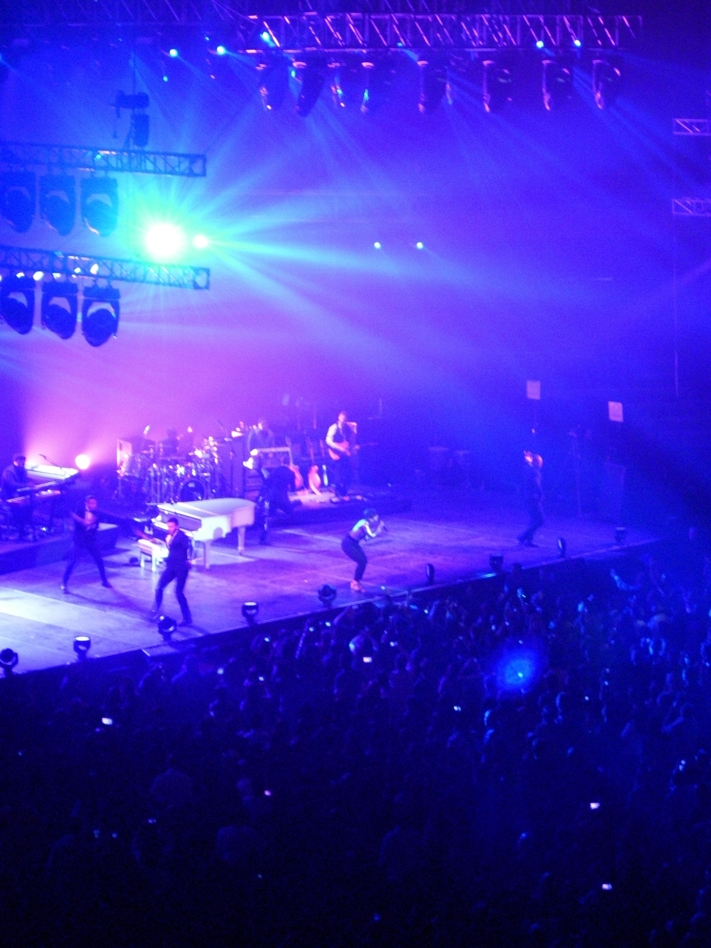 Alicia Keys cantando en el Movistar Arena. Santiago de Chile, 23 de septiembre de 2013.